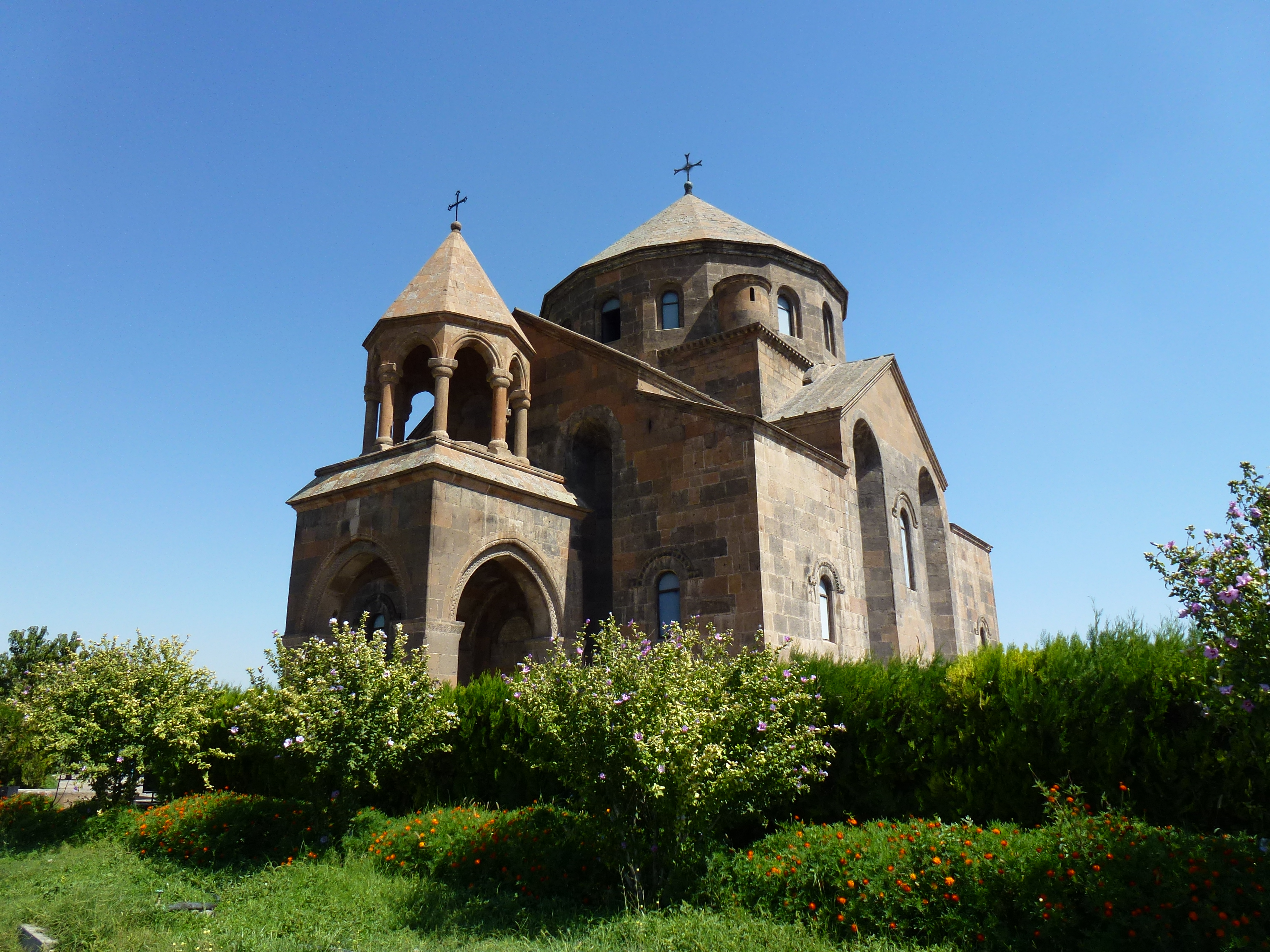 Սուրբ Հռիփսիմե եկեղեցի 2/17